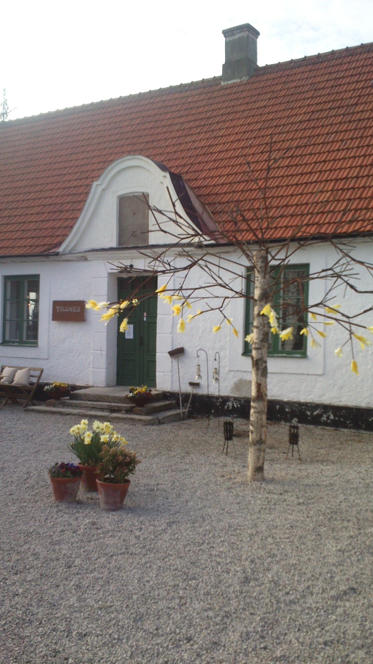 Detta är en bild på byggnadsvård och inredningsbutiken Tranes Handelskompagni i Gislöv, Simrishamn på Österlen.